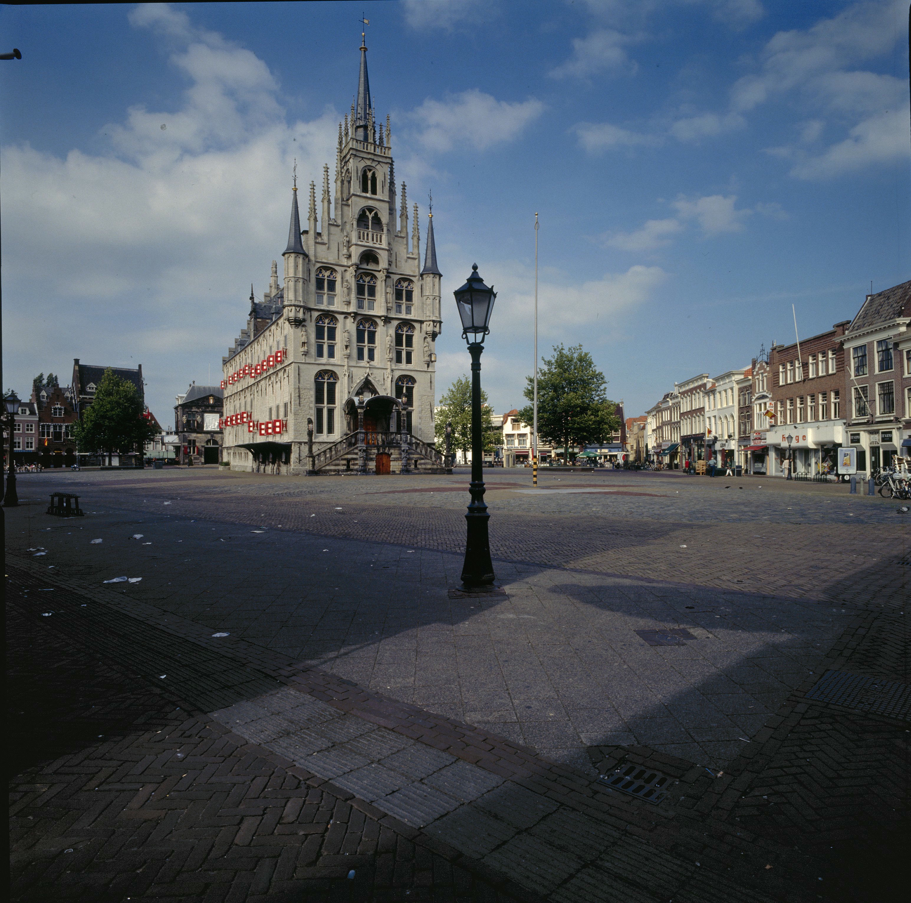 Stadhuis: Overzicht voorgevel en linker zijgevel (opmerking: Gefotografeerd voor De Nederlandse Monumenten van Geschiedenis en Kunst, Gouda)